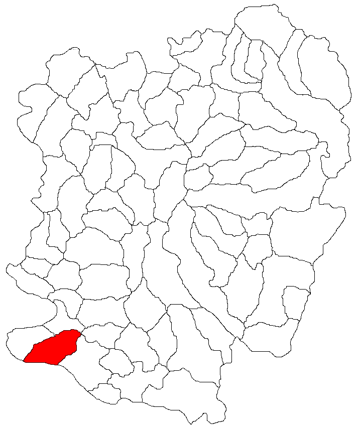 Categorie:Hărţi ale judeţului Caraş-Severin